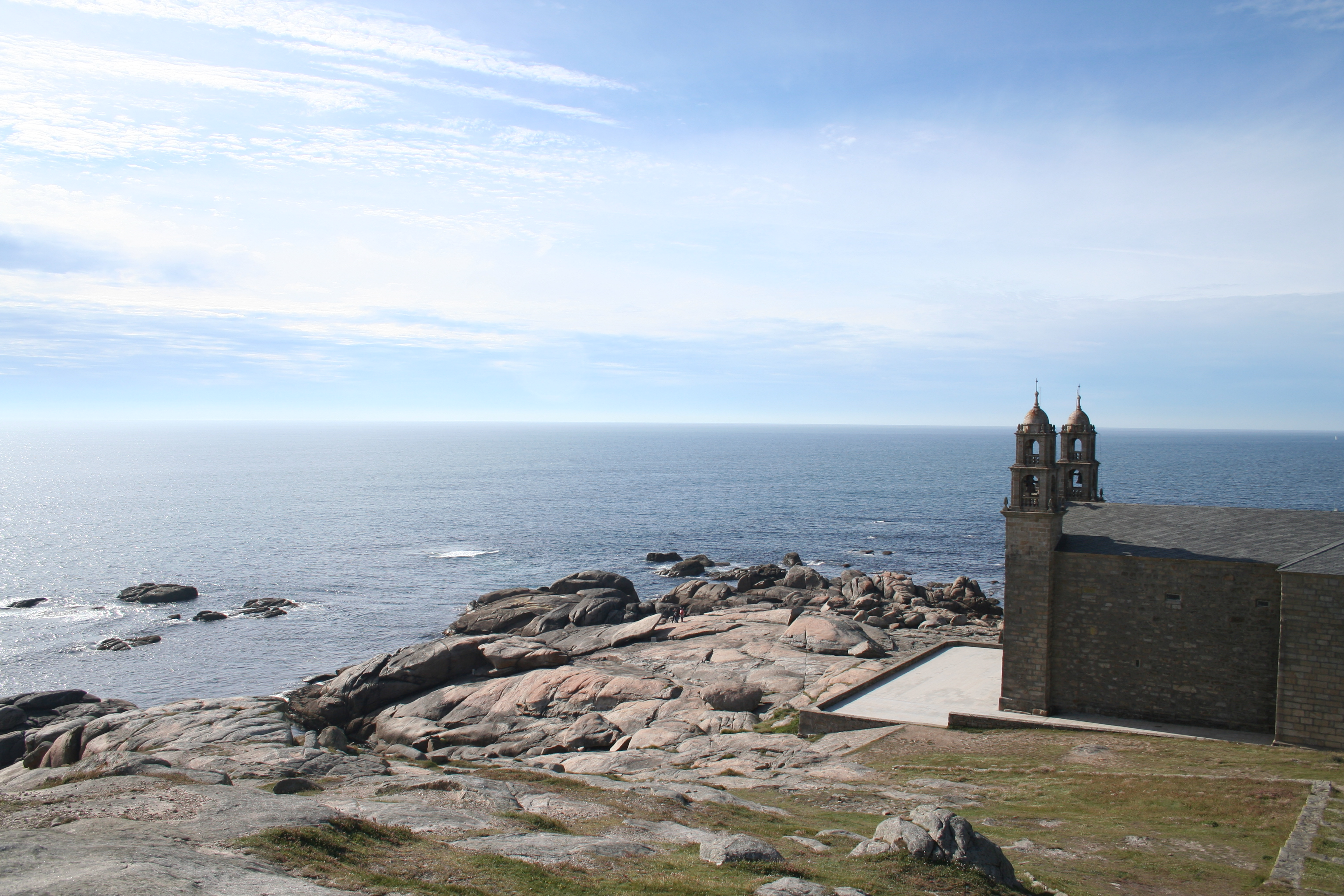 Santuario da Virxe da Barca, Muxía